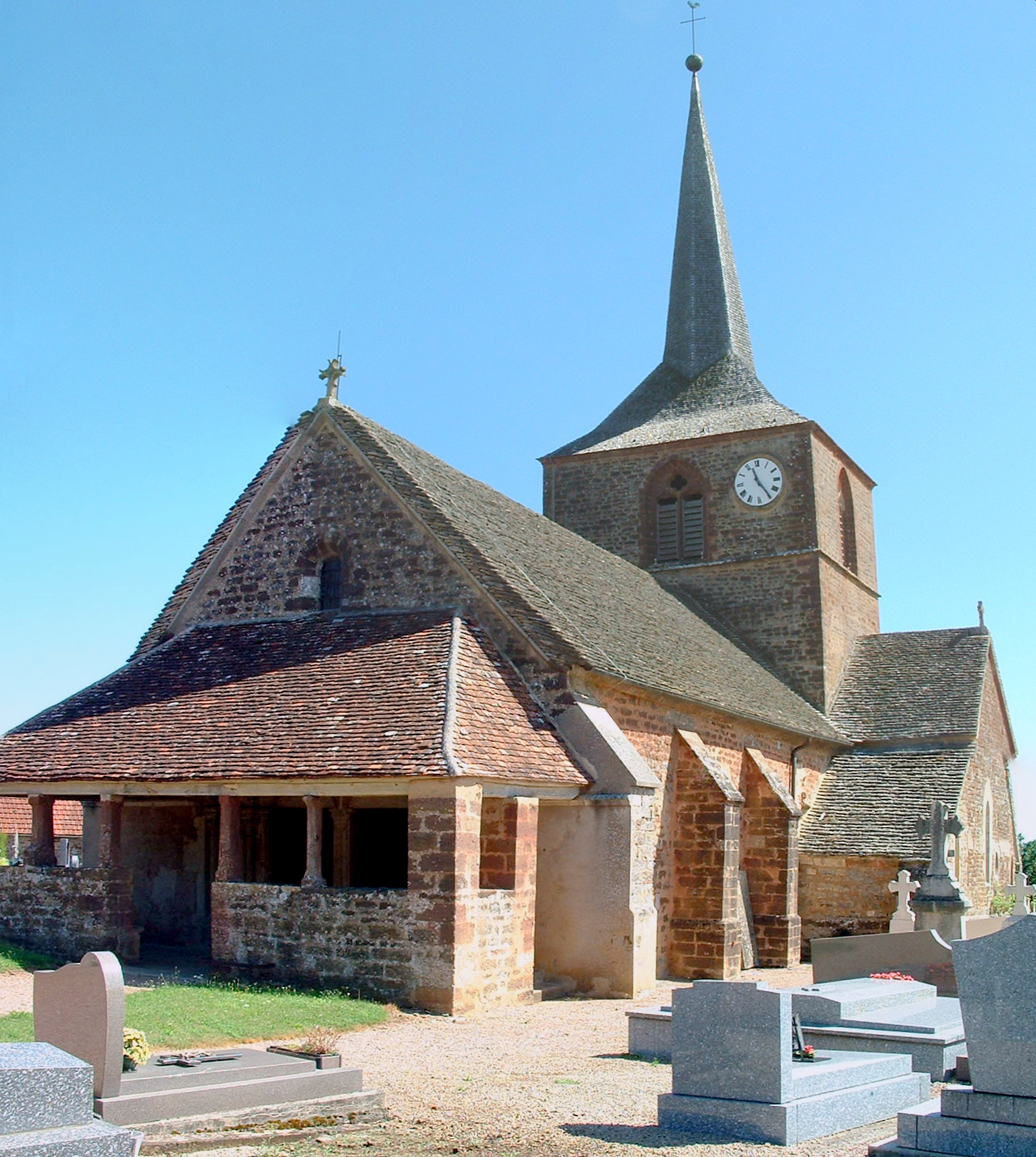 Église de Savigny-en-Terre-Plaine, Yonne